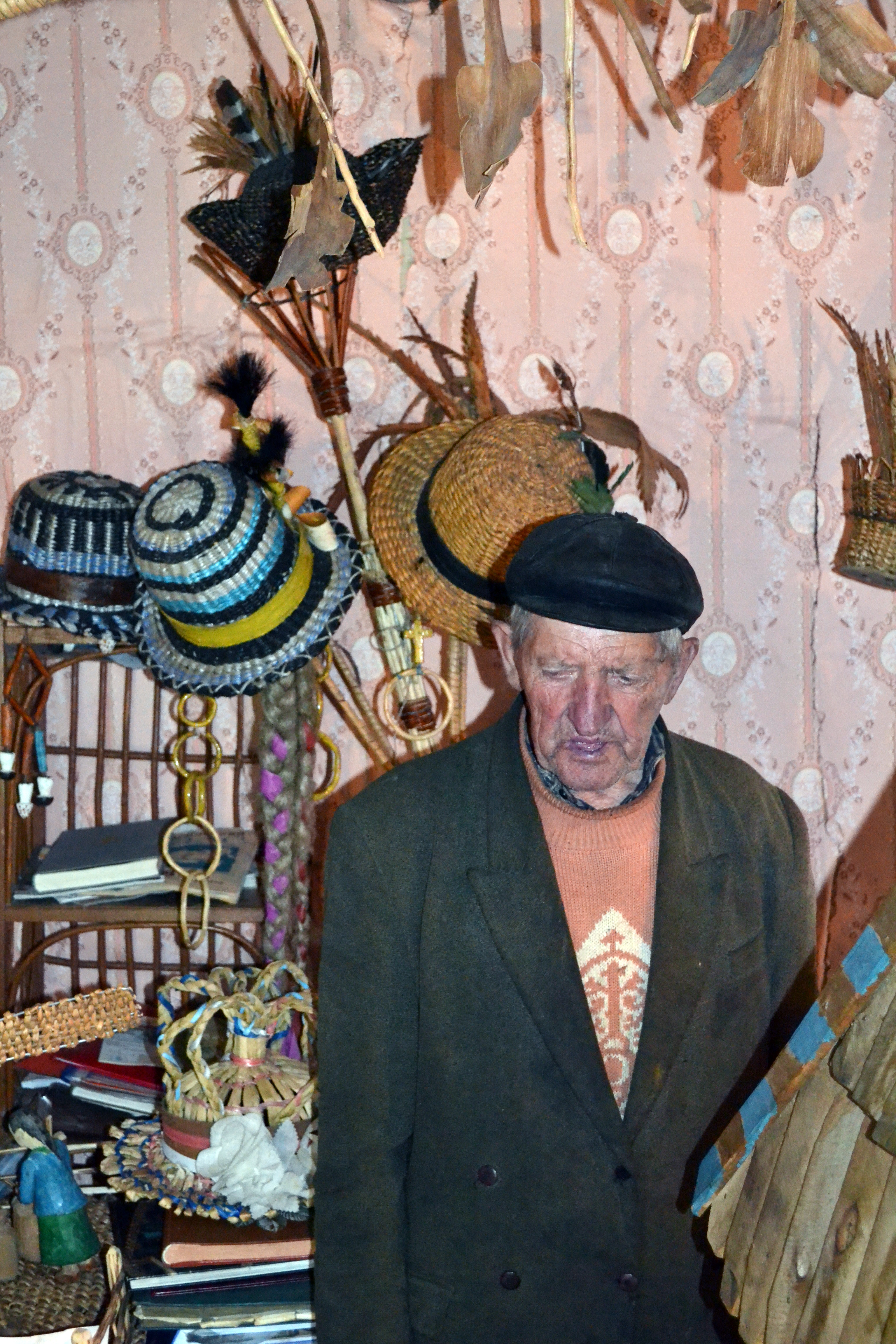 Беларуская (тарашкевіца): Музэй «Успаміны Бацькаўшчыны» на сядзібе Мікалая Тарасюка ў Стойлах Пружанскага раёну